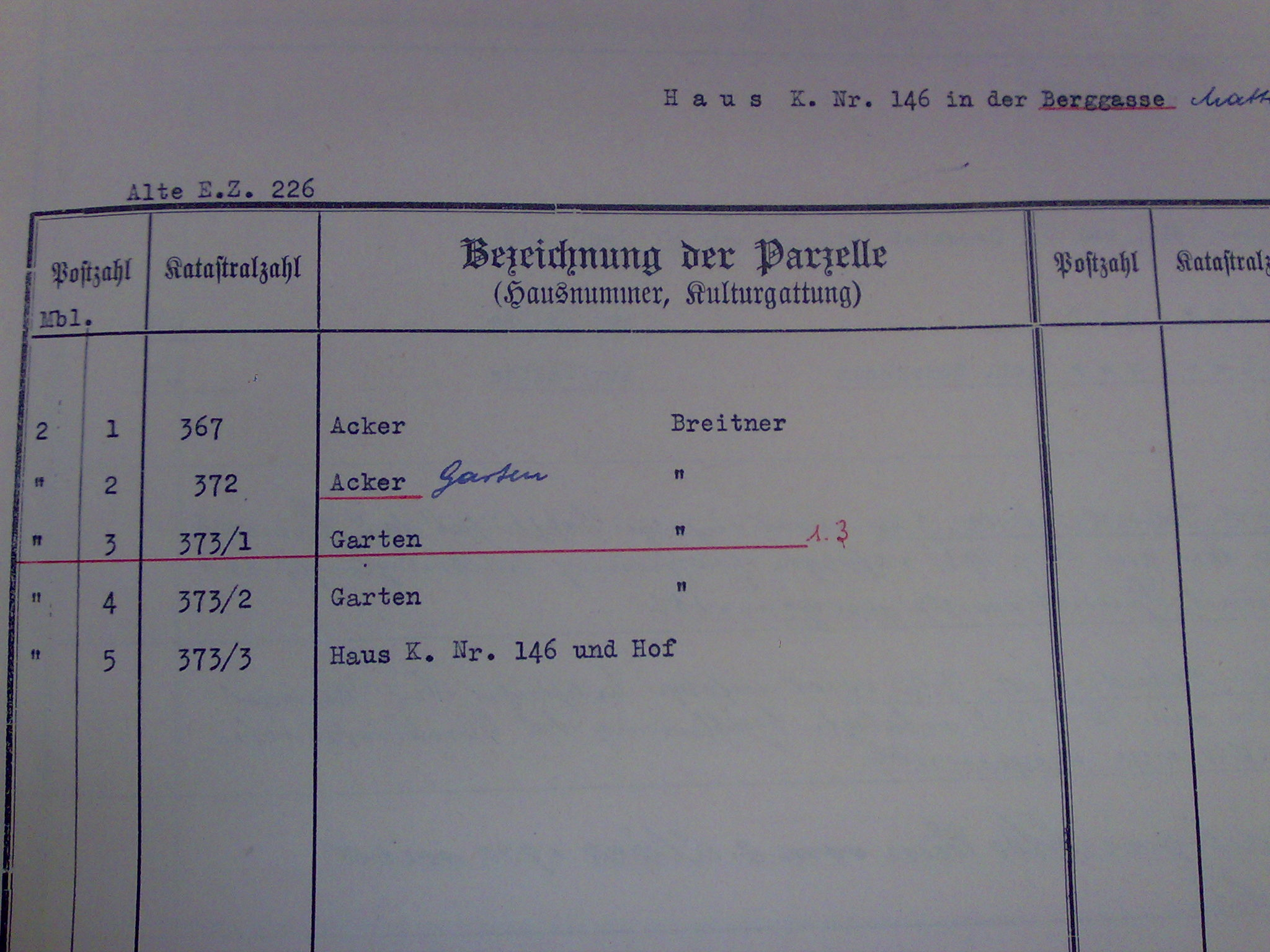 Auszug aus dem Grundbuch Mattersburg, EZ 226